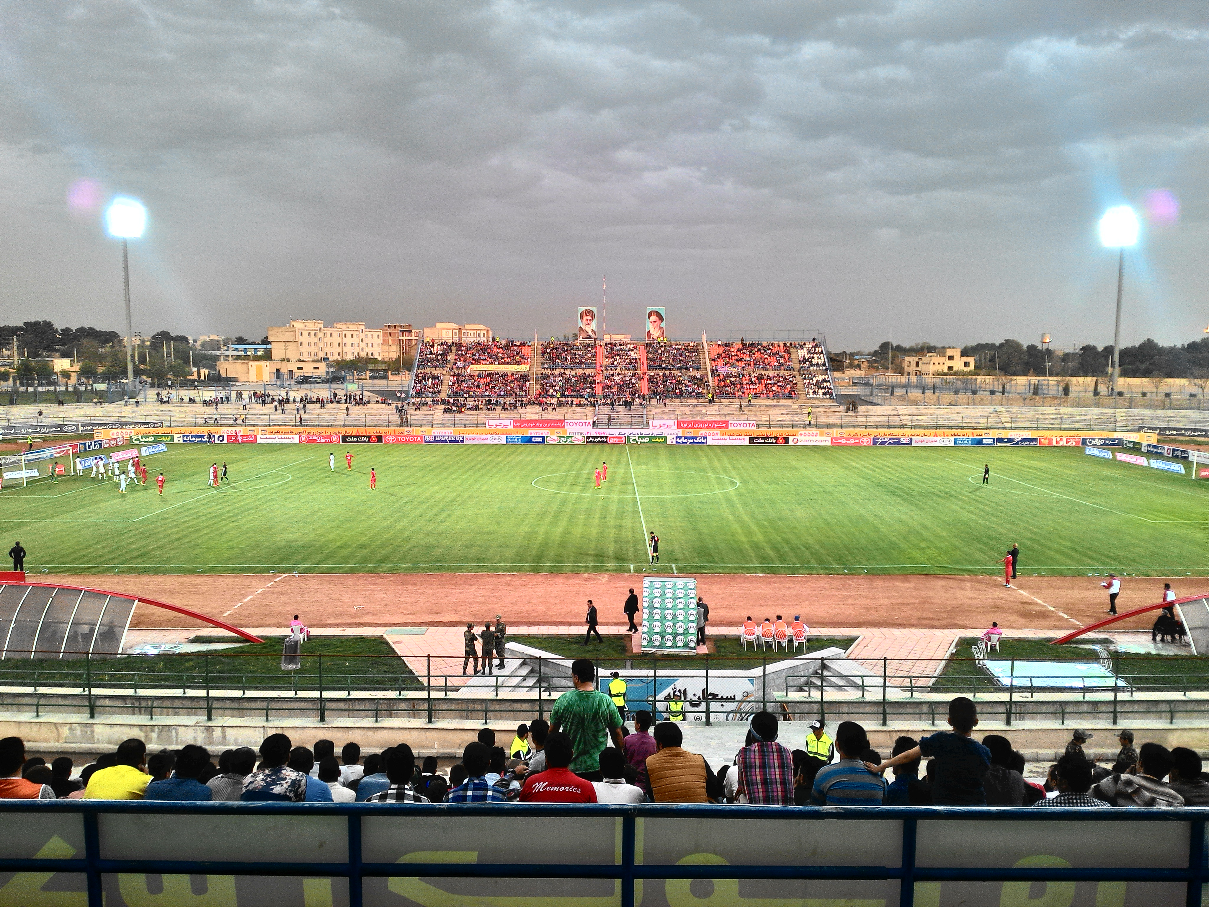 ورزشگاه شهدای شهرقدس